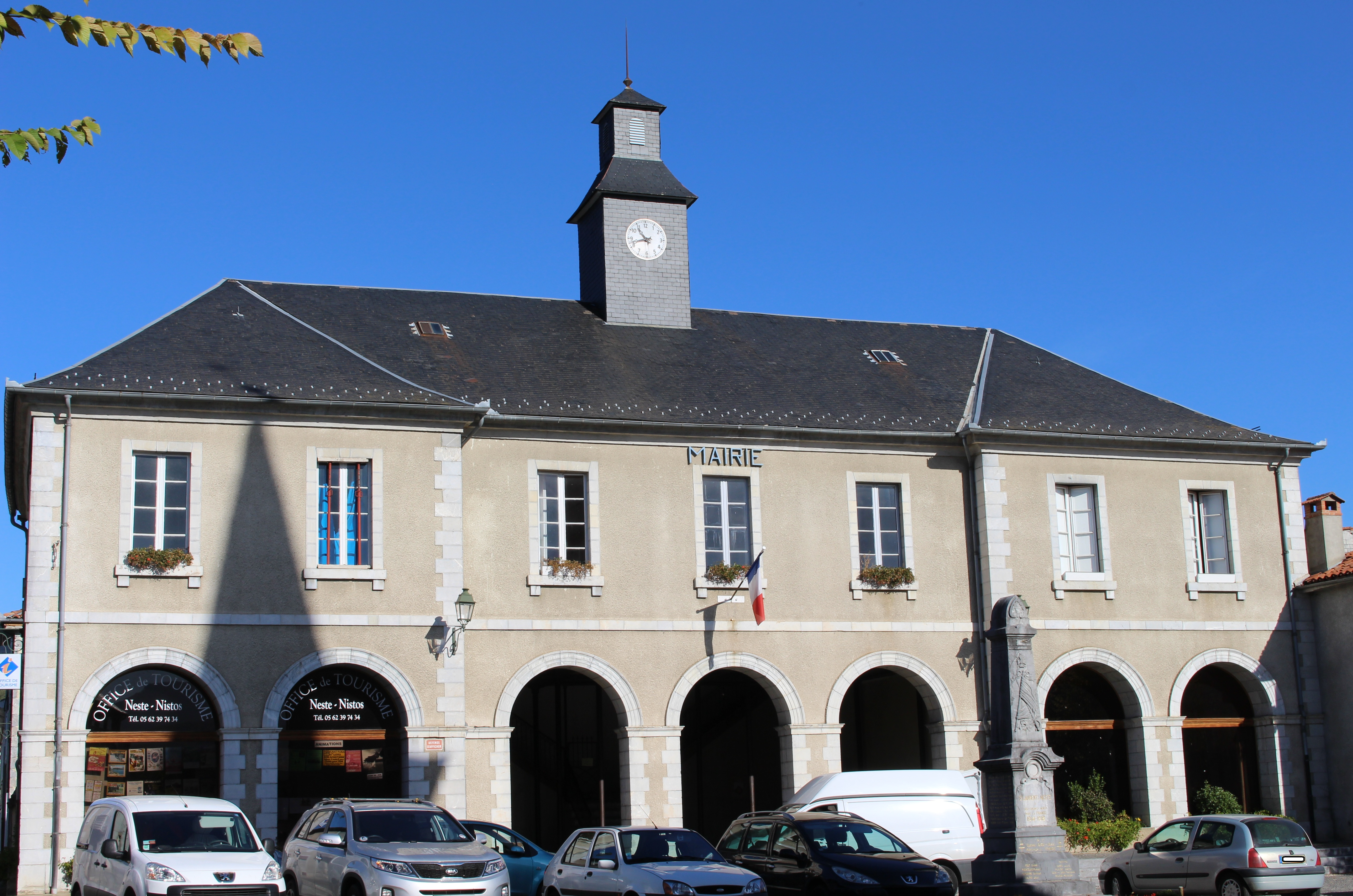 Mairie de Saint-Laurent-de-Neste (Hautes-Pyrénées)